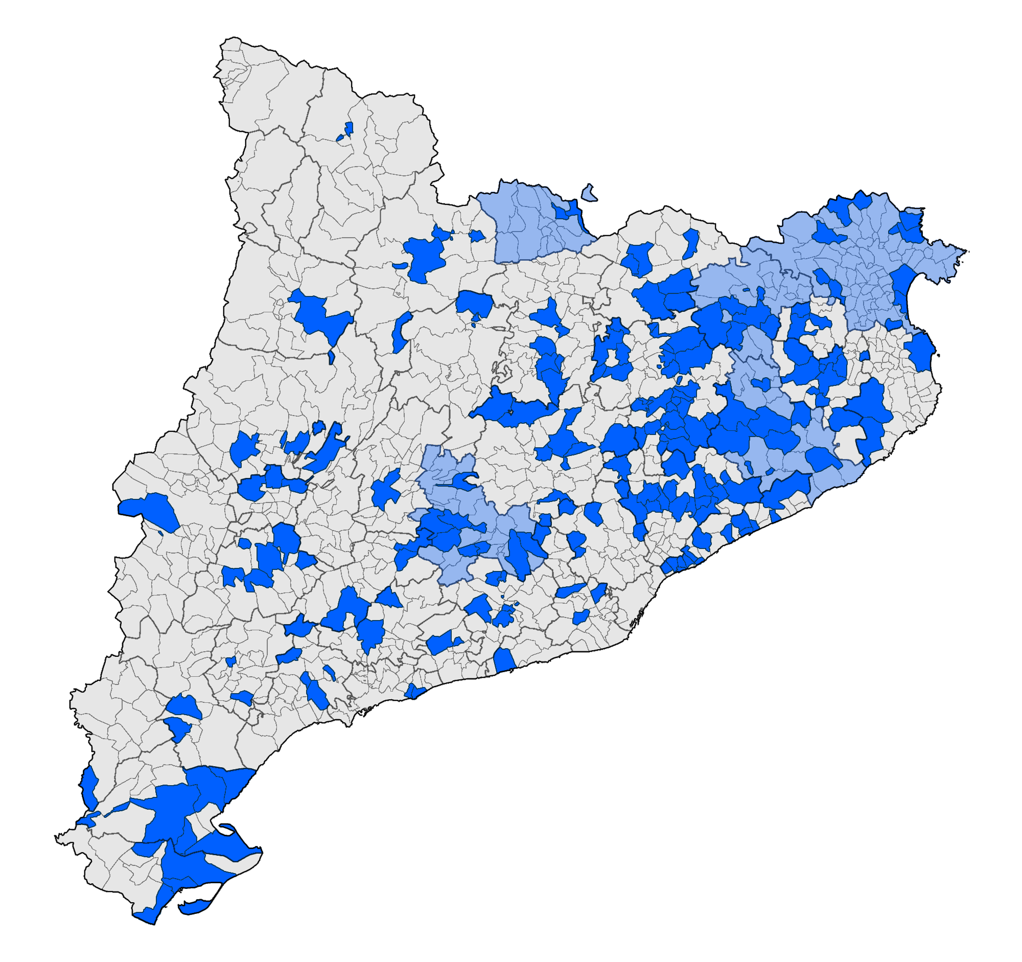 Municipis declarats Territori Català Lliure en el moment de carregar la imatge, a partir del Mapa Municipal de Catalunya allotjat a Wikimedia Commons